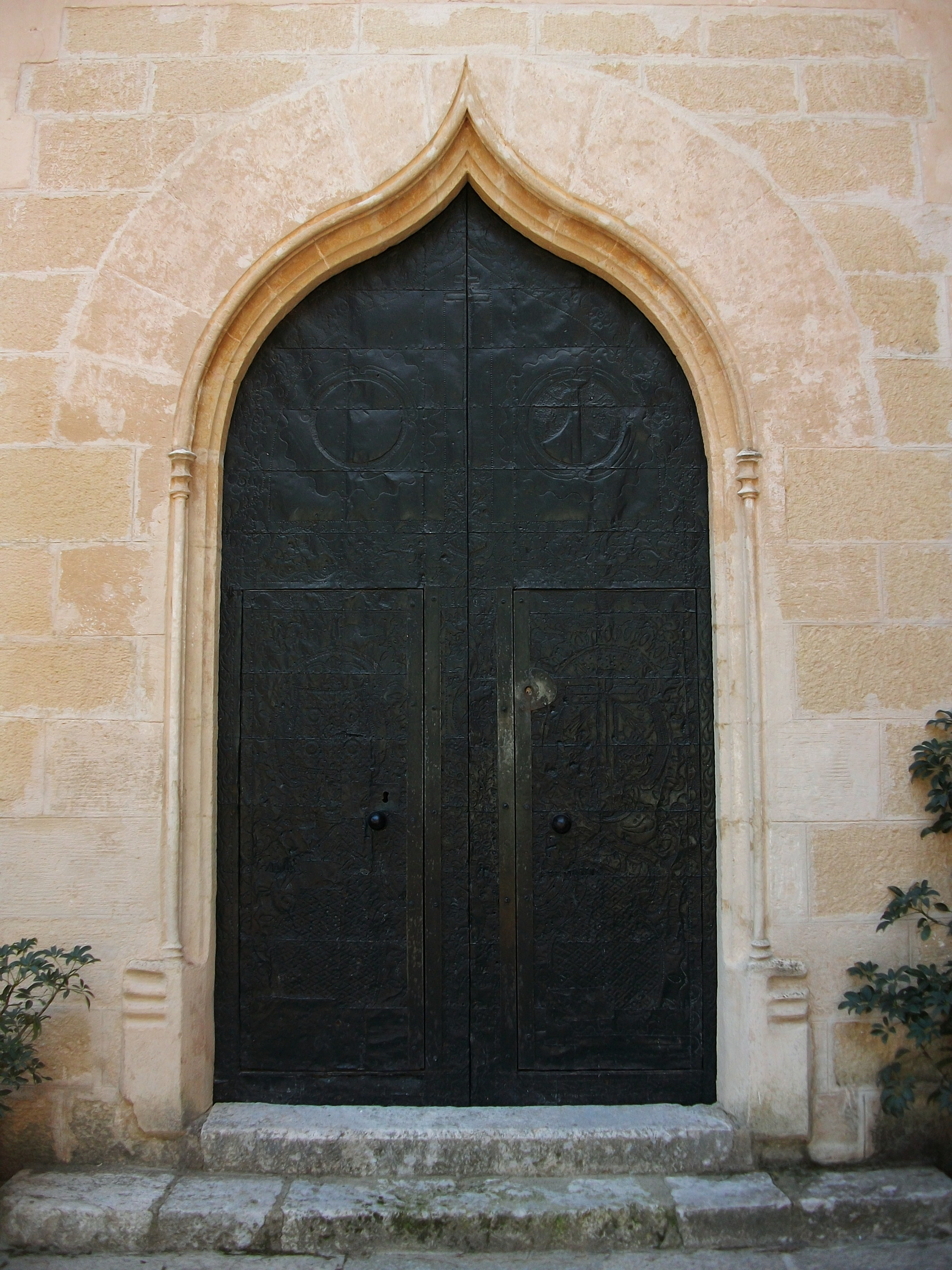 Portada de la basílica del Corpus Christi de Llutxent (monestir del Corpus Christi).